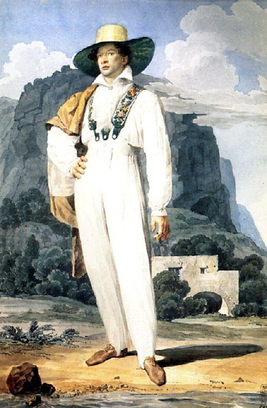 Портрет В. А. Перовского. 1824